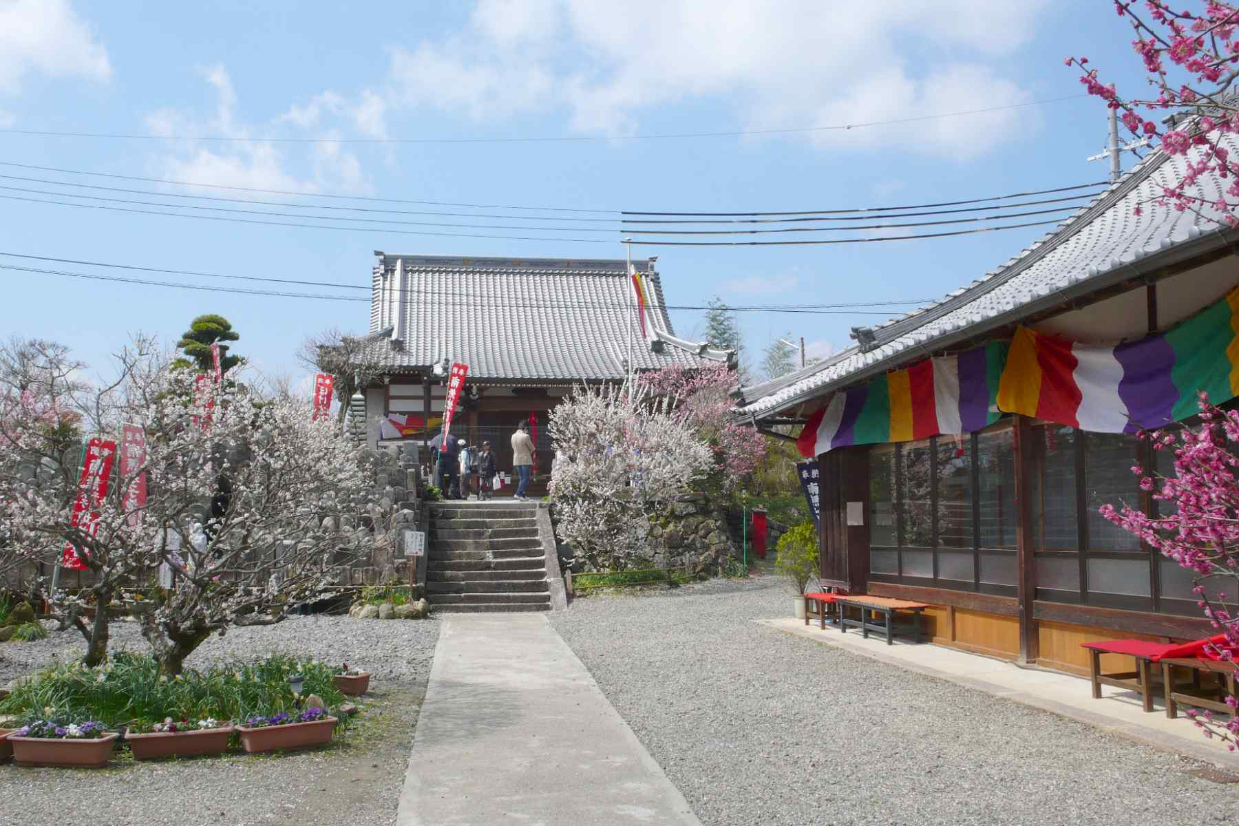 Shinpuku-ji temple at Tsukigase, Nara-shi, Nara-ken, Japan.